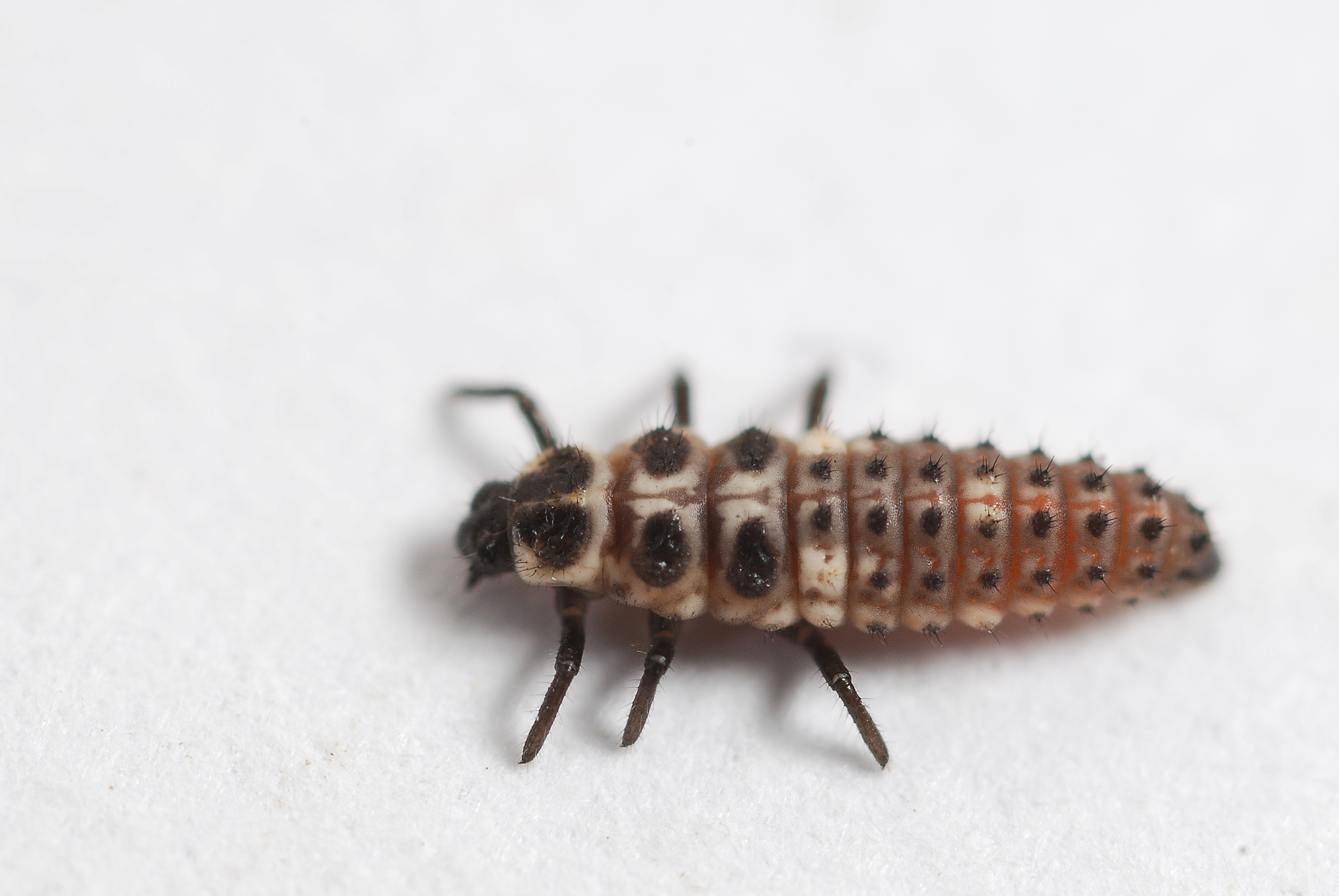 3rd stage larva